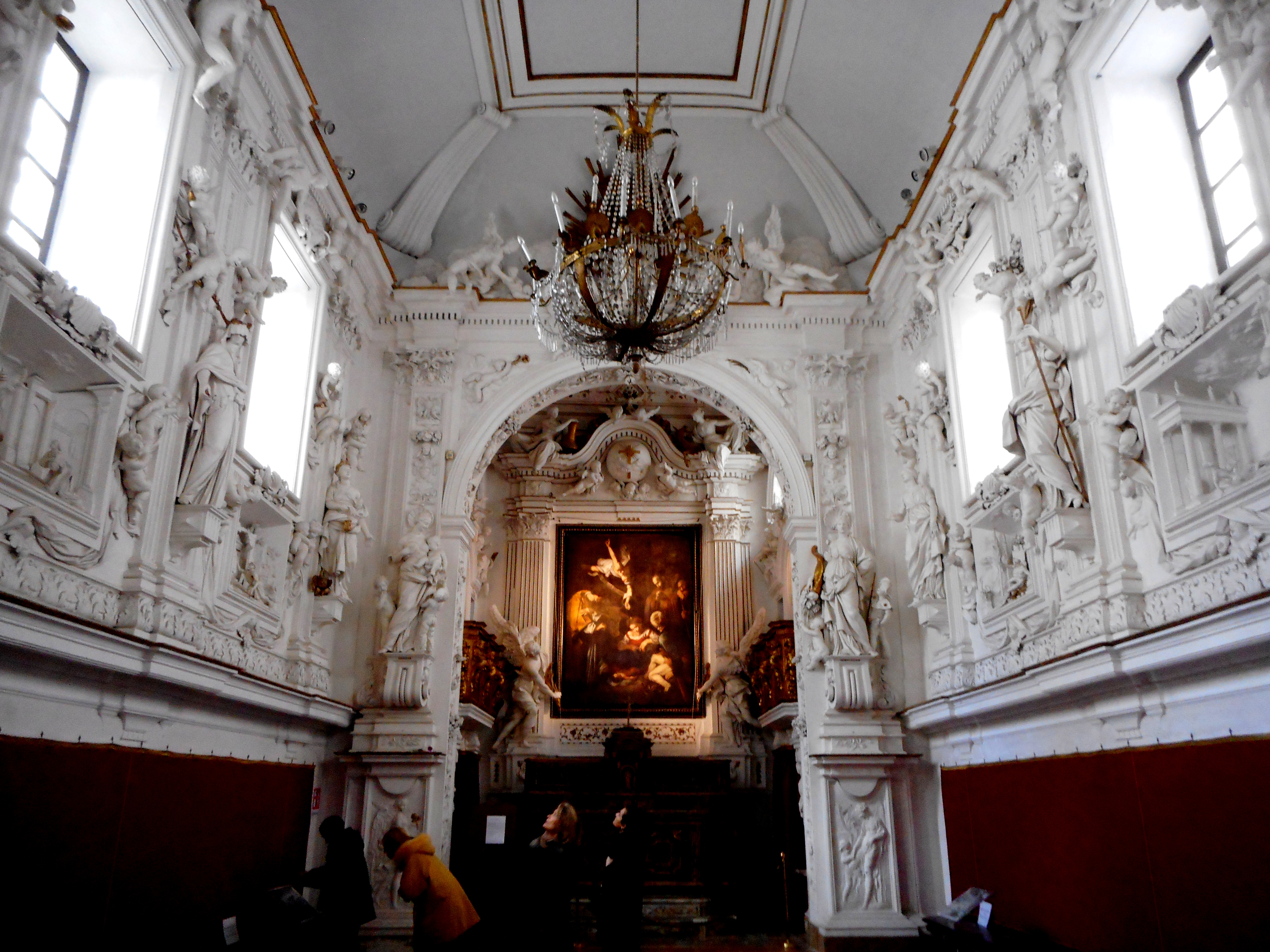 La riproduzione della Natività di Caravaggio è stata sistemata sopra l'altare al posto dell'originale trafugato nel 1969 e mai ritrovato.